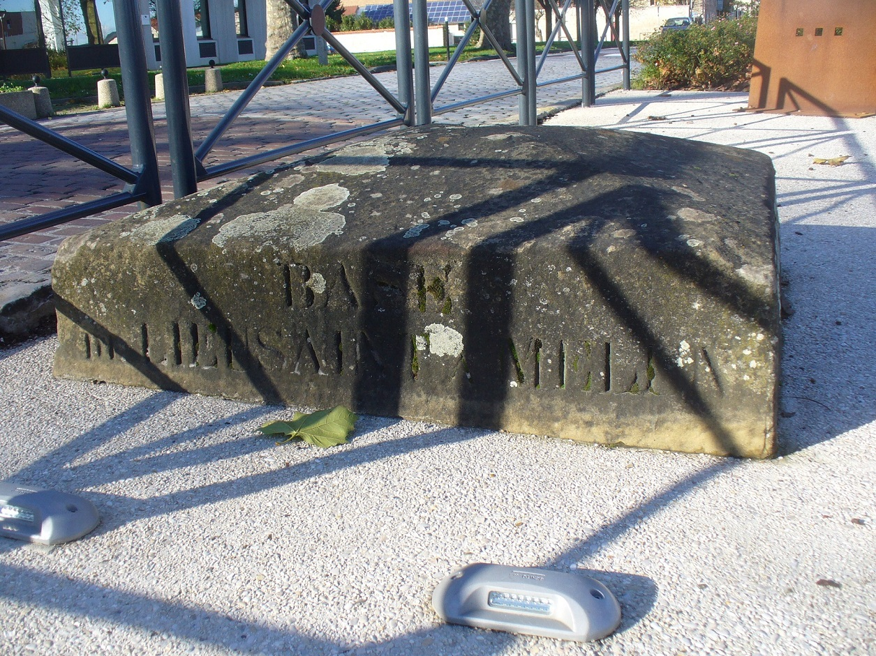 Base lieusaint (77)